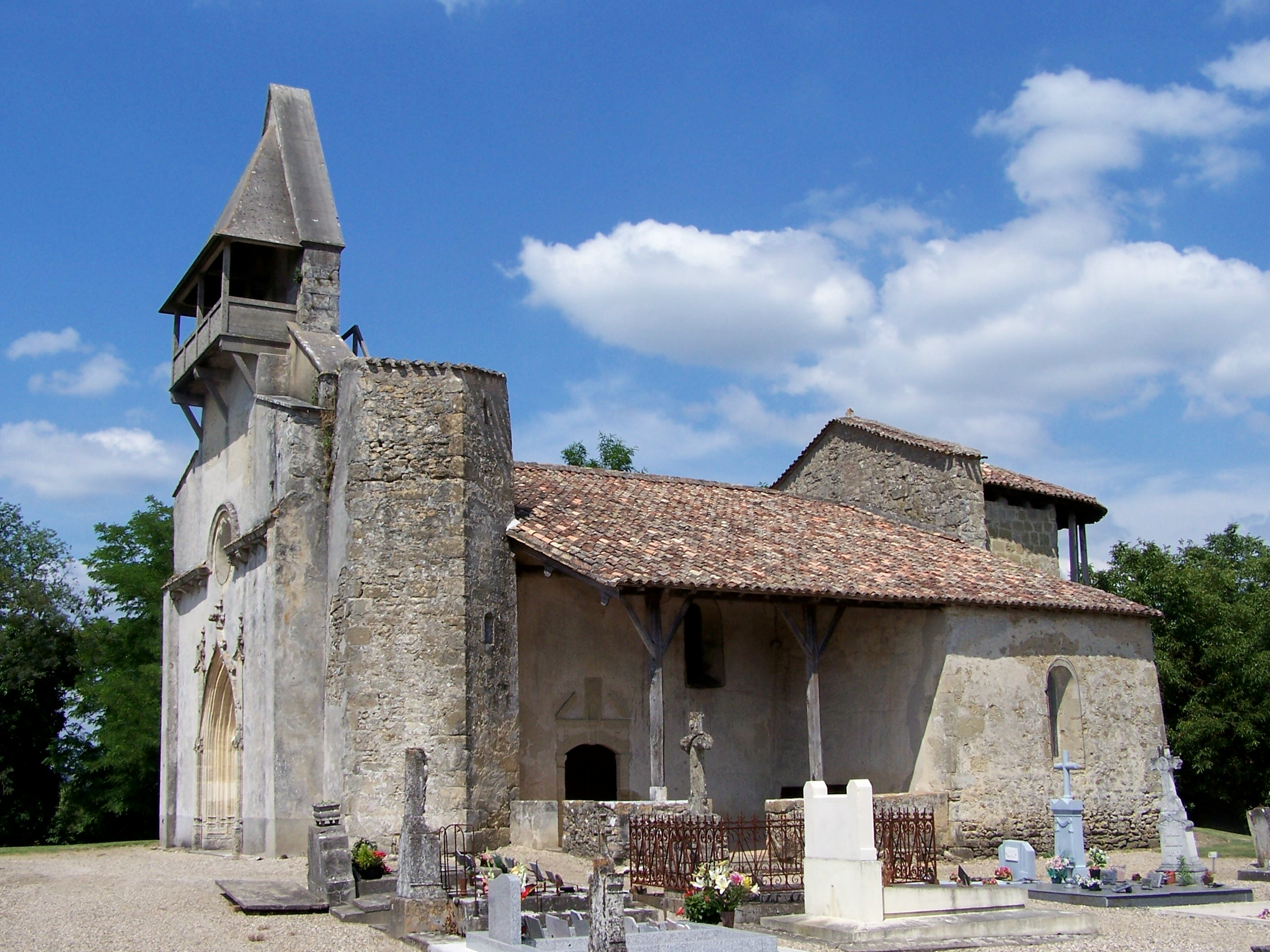 Église Saint-Romain de Mazérac à Castets-en-Dorthe, Gironde, France